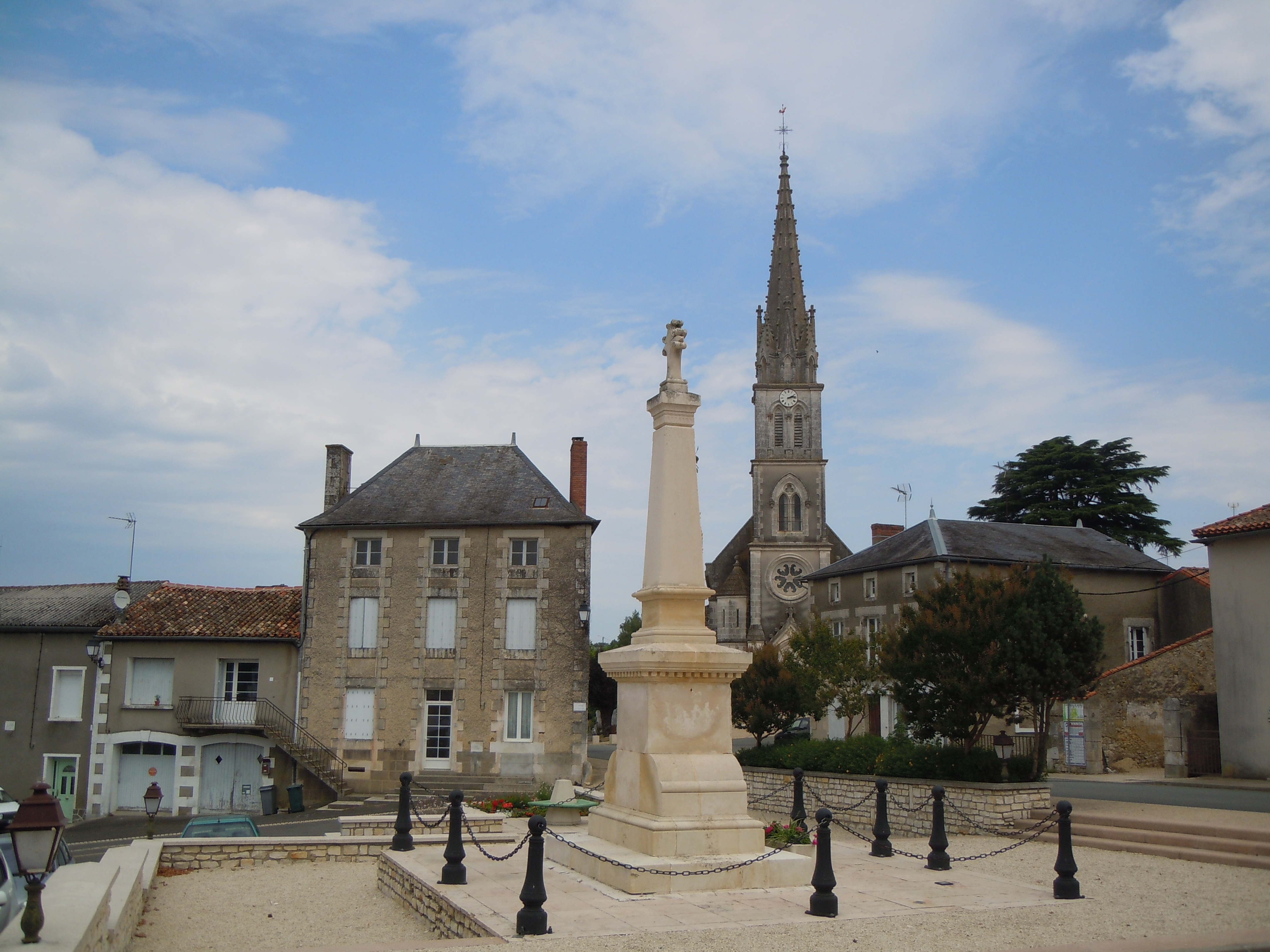 Lhommaizé, Place du Souvenir.